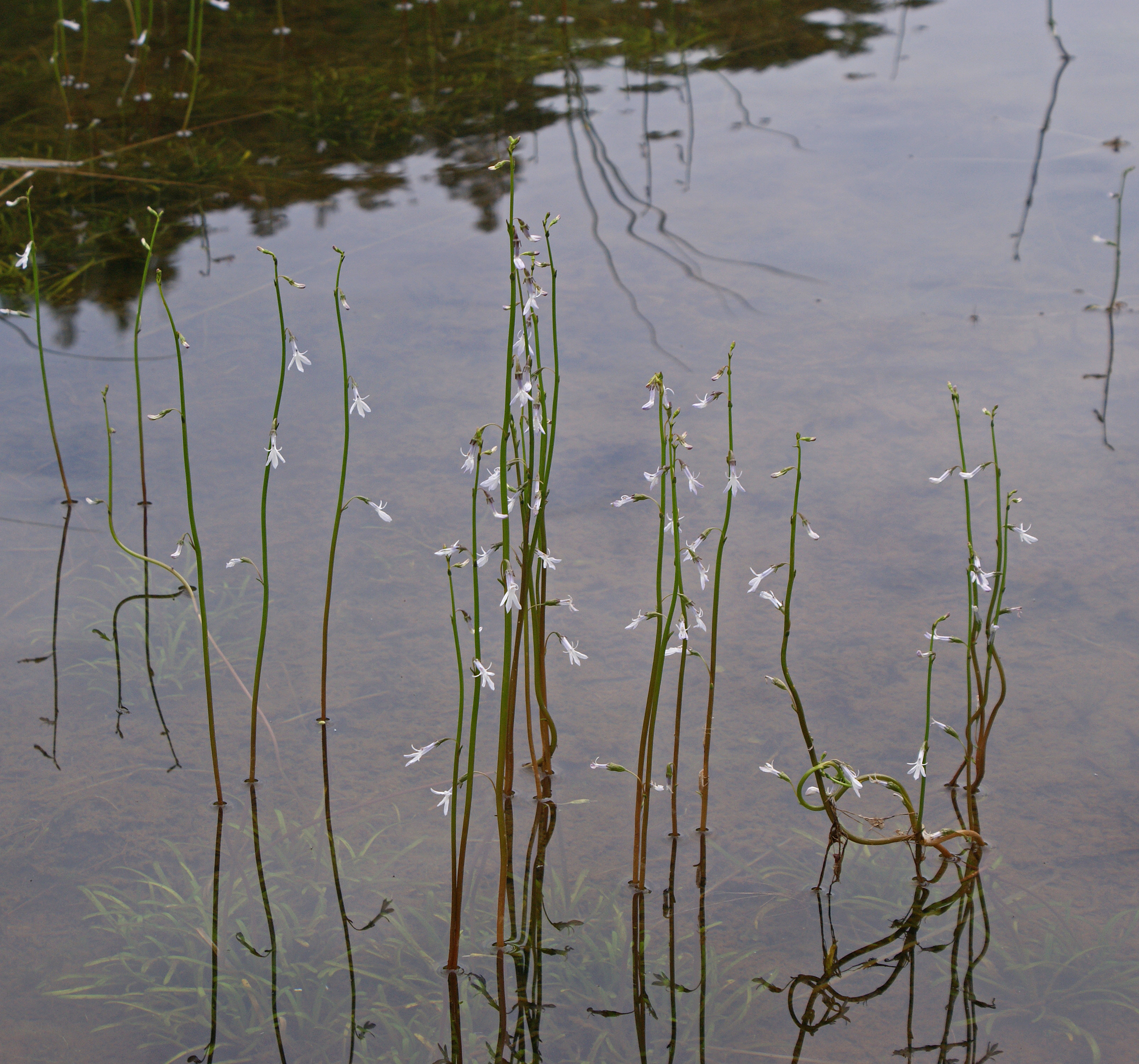 Botnegras - Water Lobelia - Lobelia dortmanna